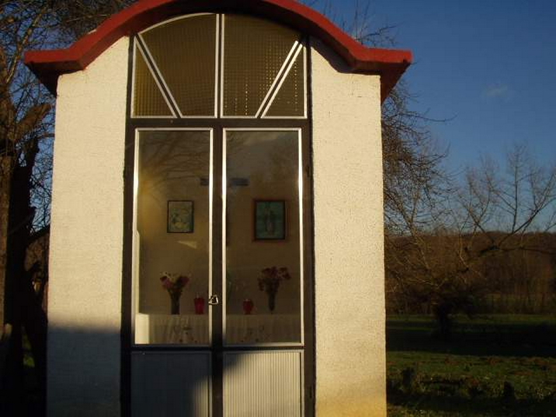 Žunci - Kapelica